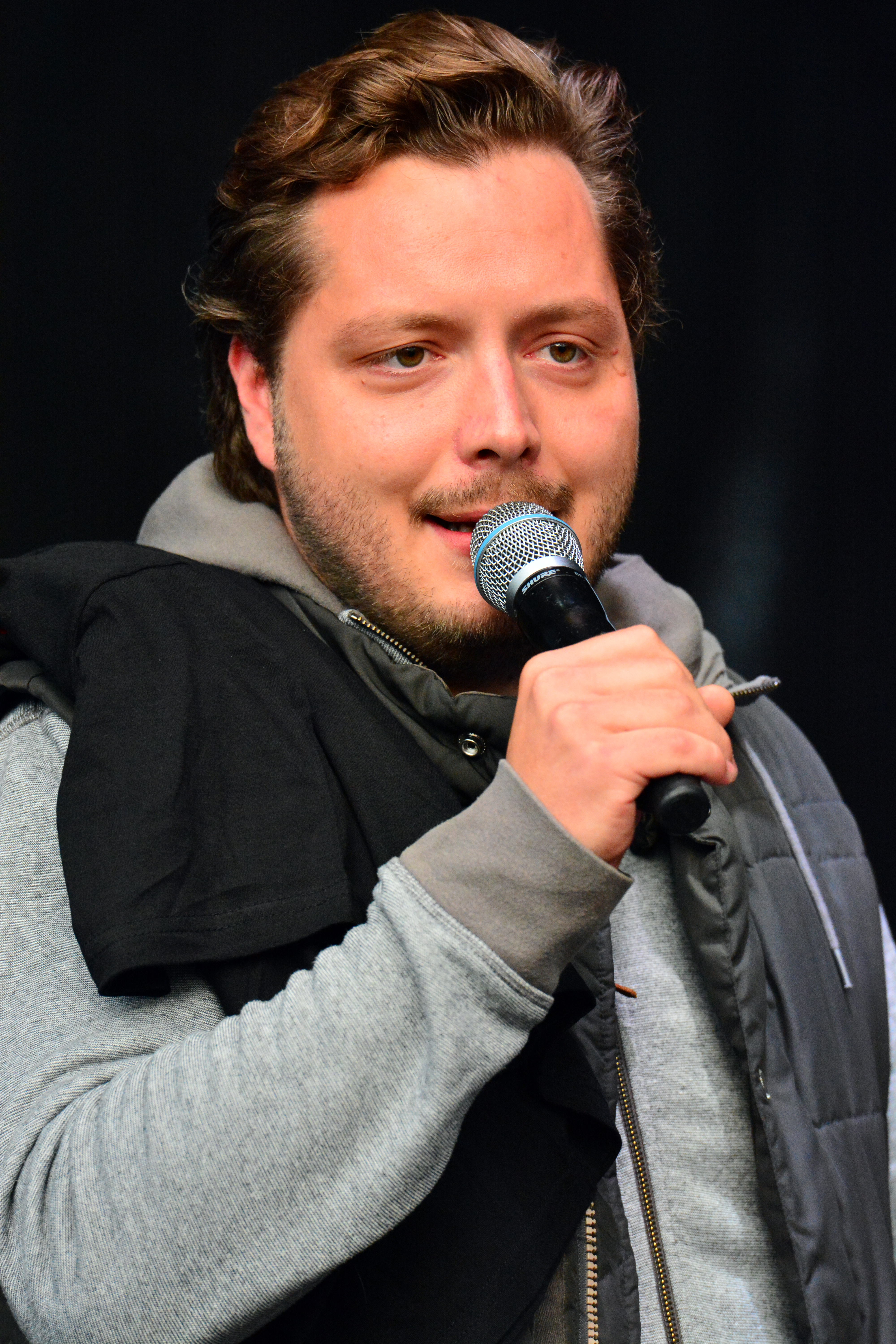 Tim Koschwitz, Moderator von Radio Schleswig-Holstein (R.SH) beim Tower-Festival 2014